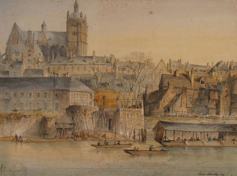 La ville du Mans en 1854 avec l'ancien quartier de Gourdaine, aujourd'hui disparu.